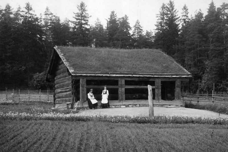 Åmlidstua, årestue fra Åmlid, Valle, i Setesdal, ca.1650-1700 . Nå på Norsk Folkemuseum